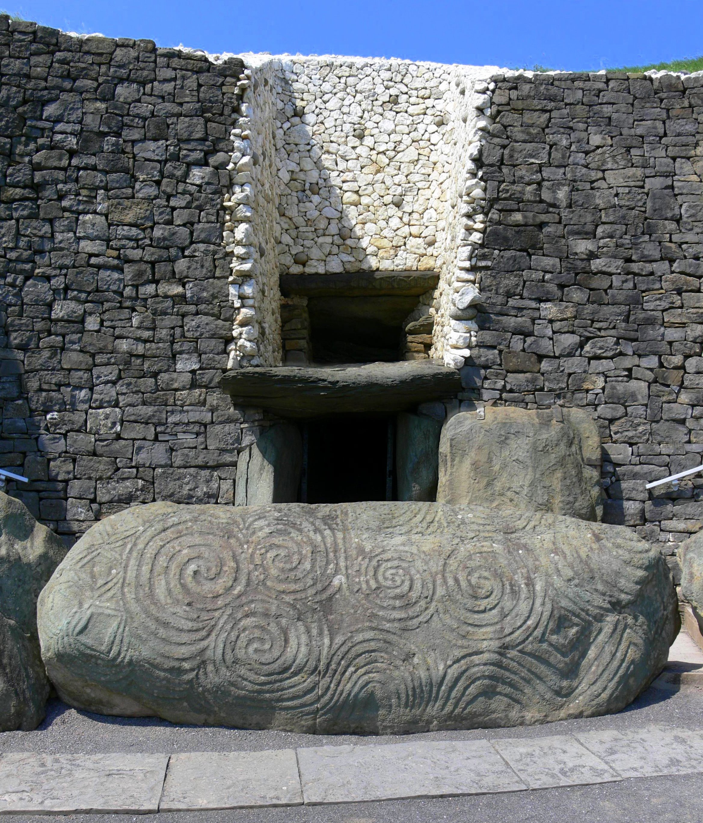 Newgrange